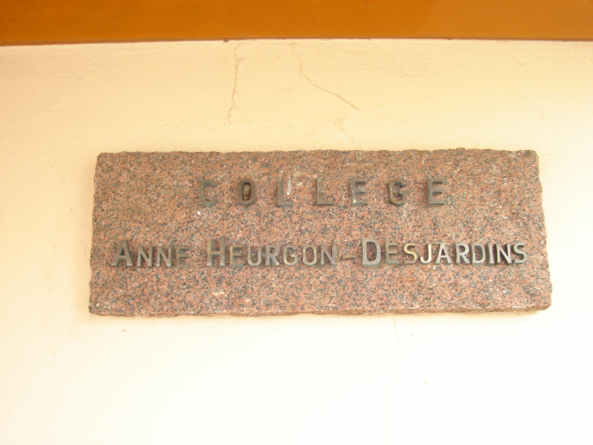 Photographie de la plaque comportant le nom du collège Anne Heurgon-Desjardins à Cerisy-la-Salle.